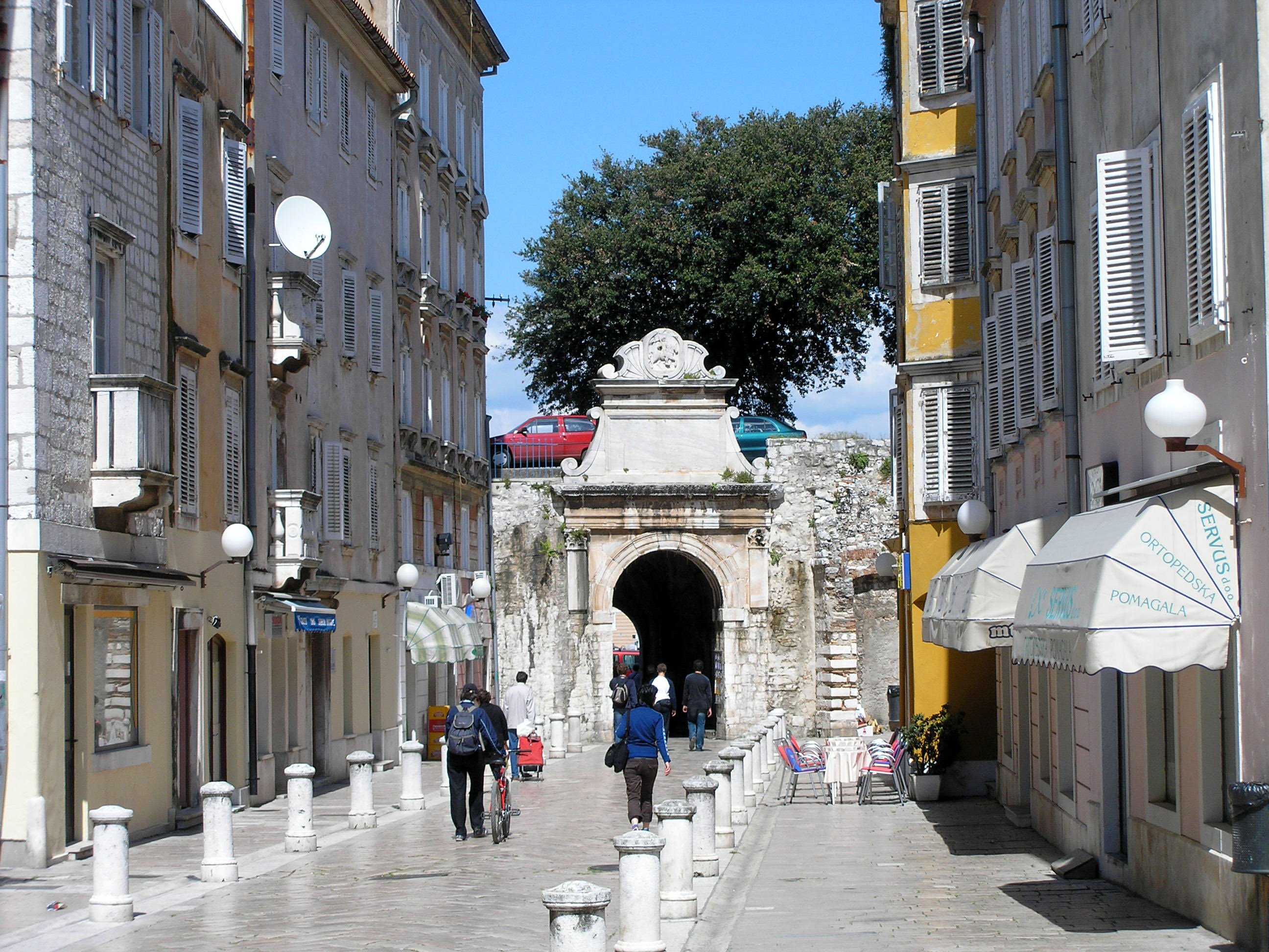 Morska vrata/Porta marina